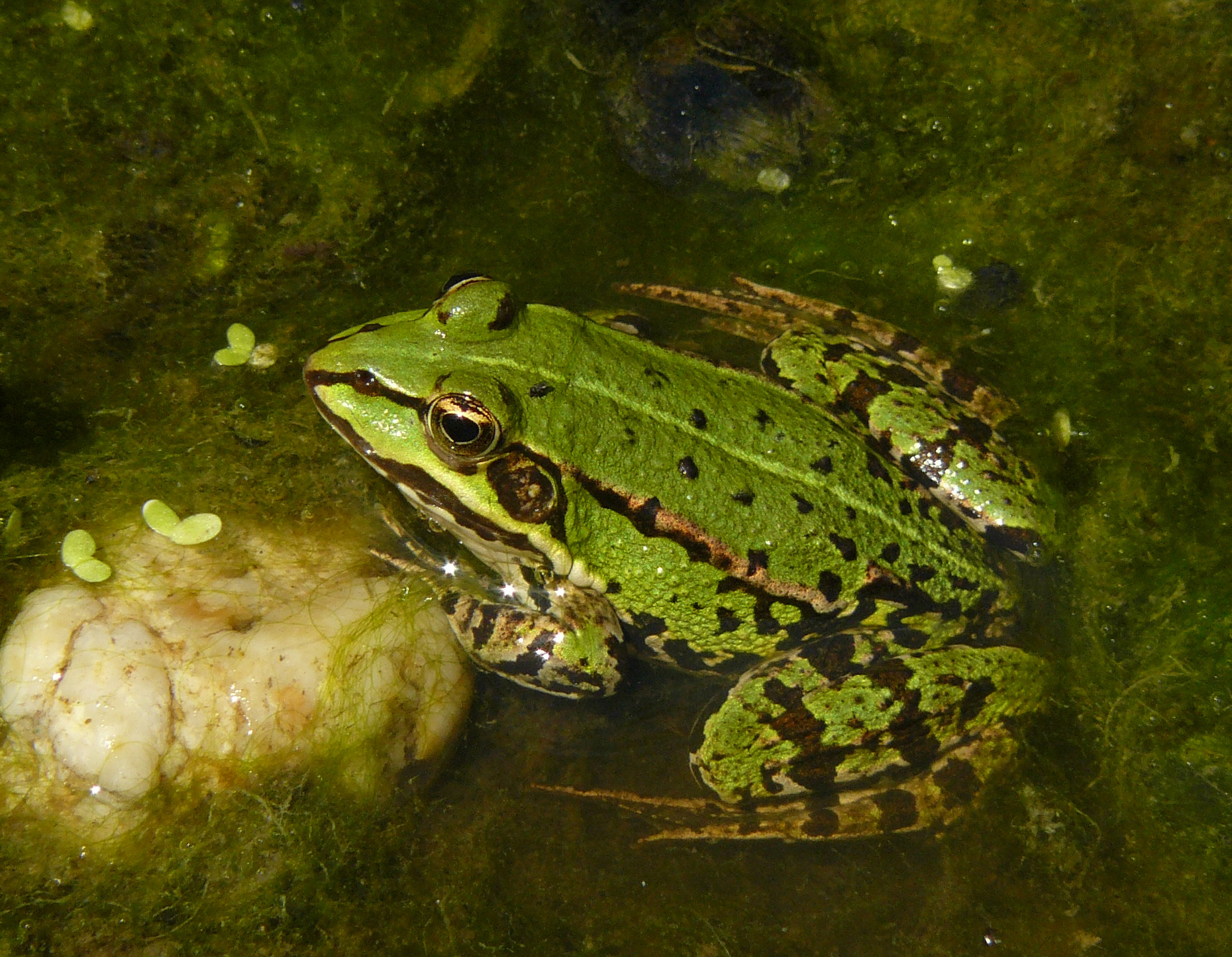 Rana esculenta